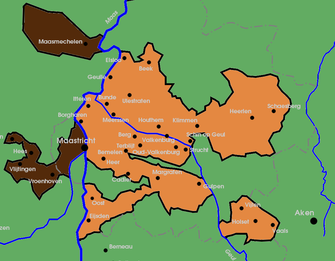 Kaart van Staats-Overmaas na het sluiten van het Verdrag van Fontainebleau in 1785 totaan het sluiten van het Verdrag van Den Haag.